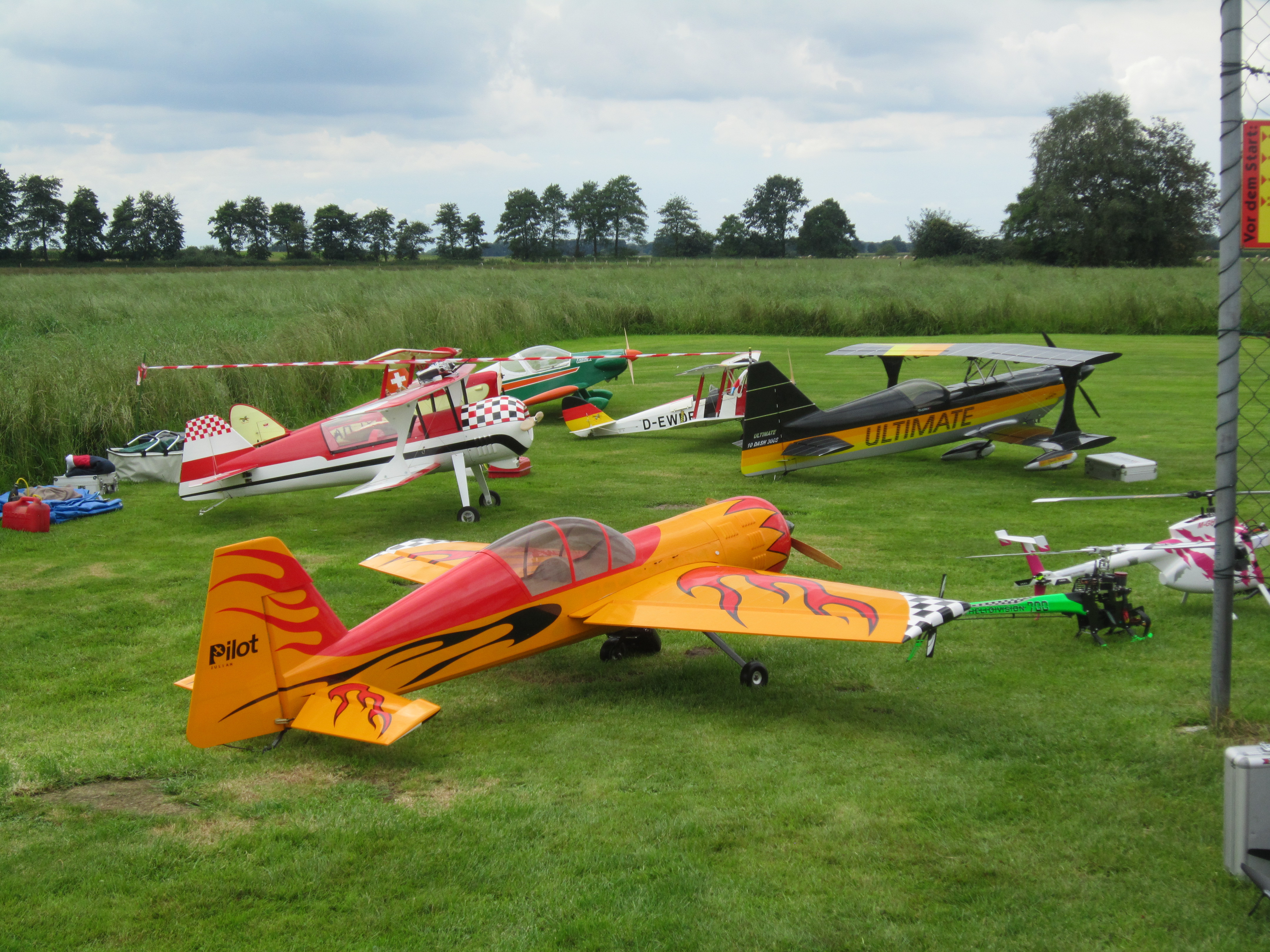 Modellflugzeuge während des Modellflugtags 2016 in Groß-Roscharden (Gemeinde Lastrup, Landkreis Cloppenburg, Niedersachsen)